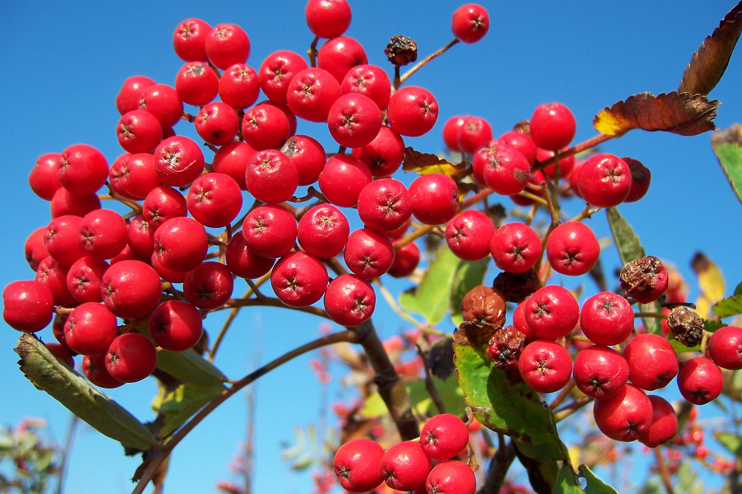 Nordseeinsel Spiekeroog: Vogelbeere, auch Eberesche genannt (Sorbus aucuparia)